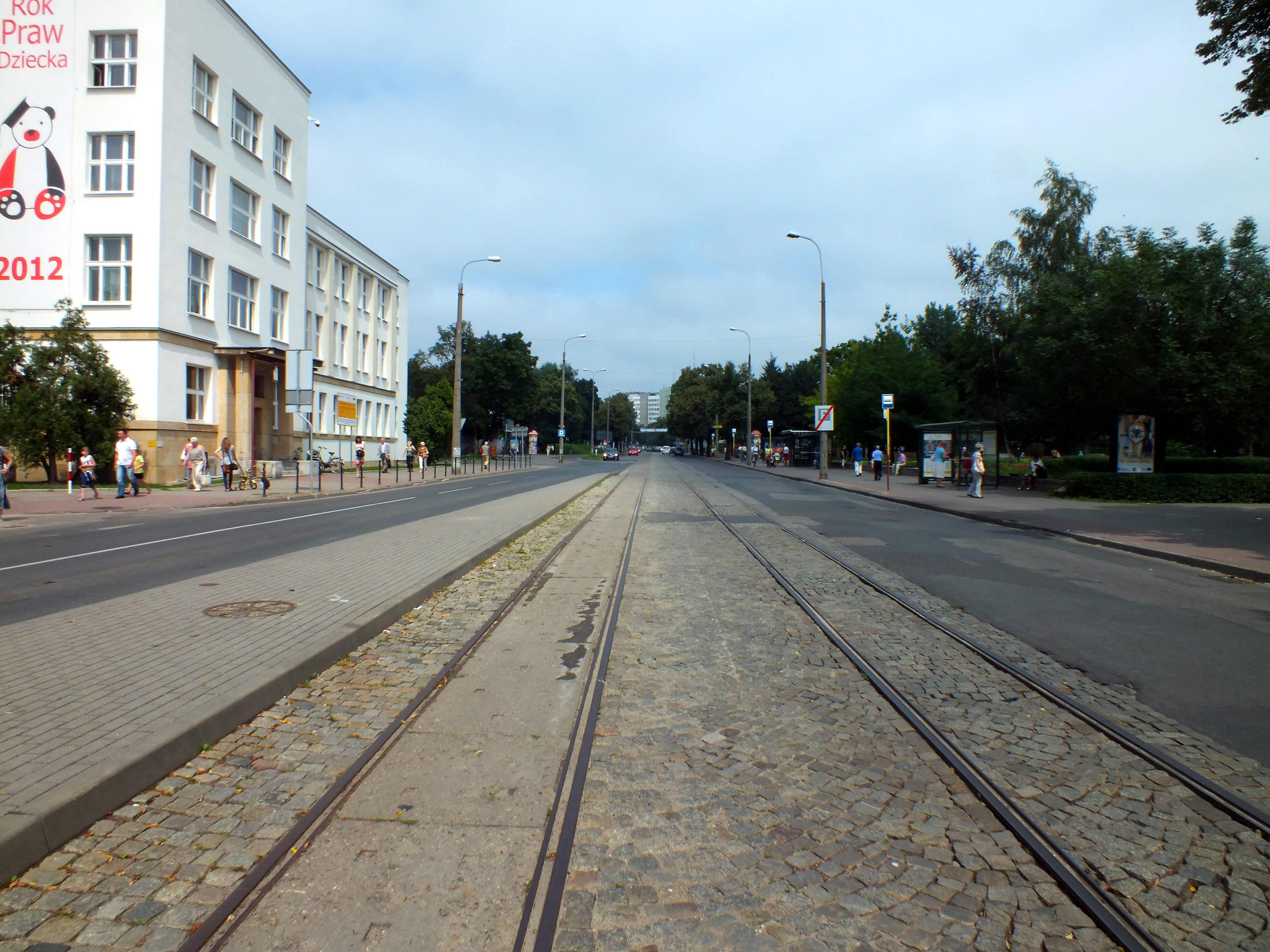 Aleja Solidarności w Toruniu